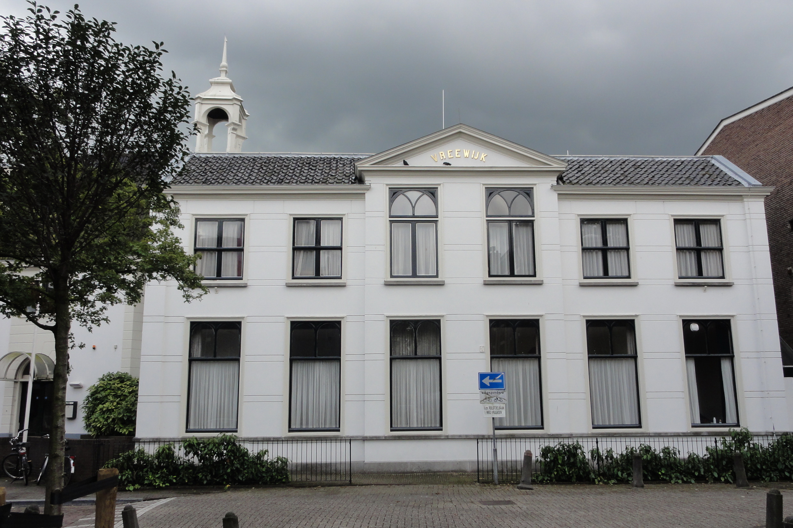 Huize Vreewijk, Vreewijkstraat 8 in Leiden.